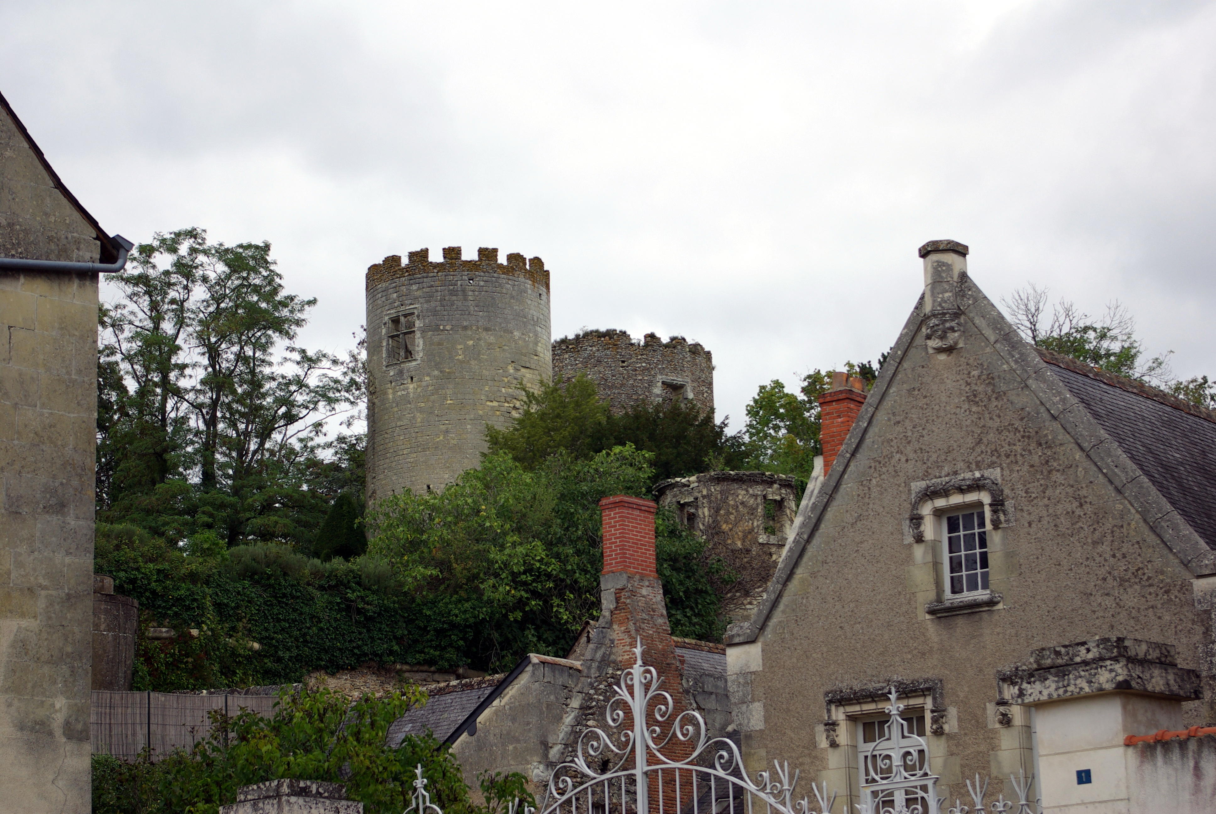 Tours de l'ancien château de Cinq-Mars-la-Pile.